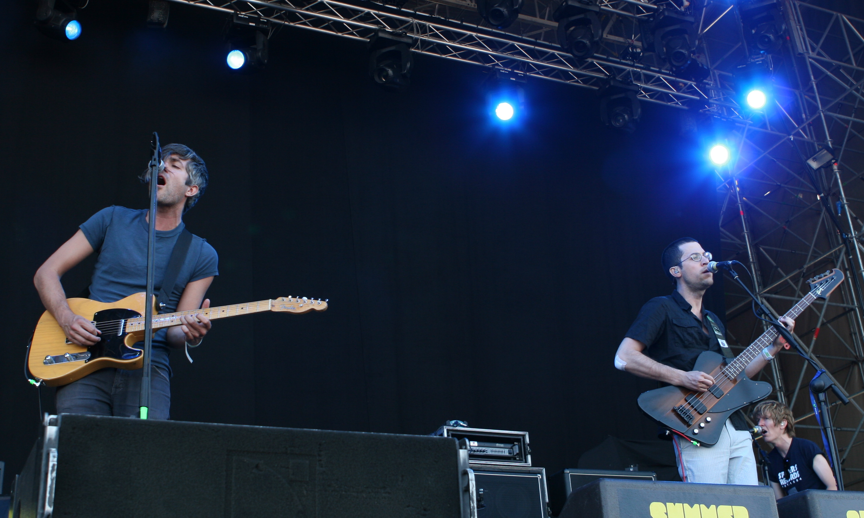 We Are Scientists